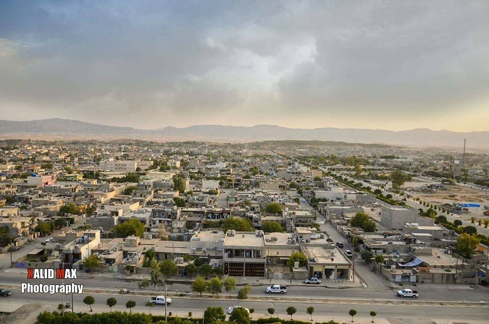 کوردی: دیمەنێکی قەزای شارەزوور